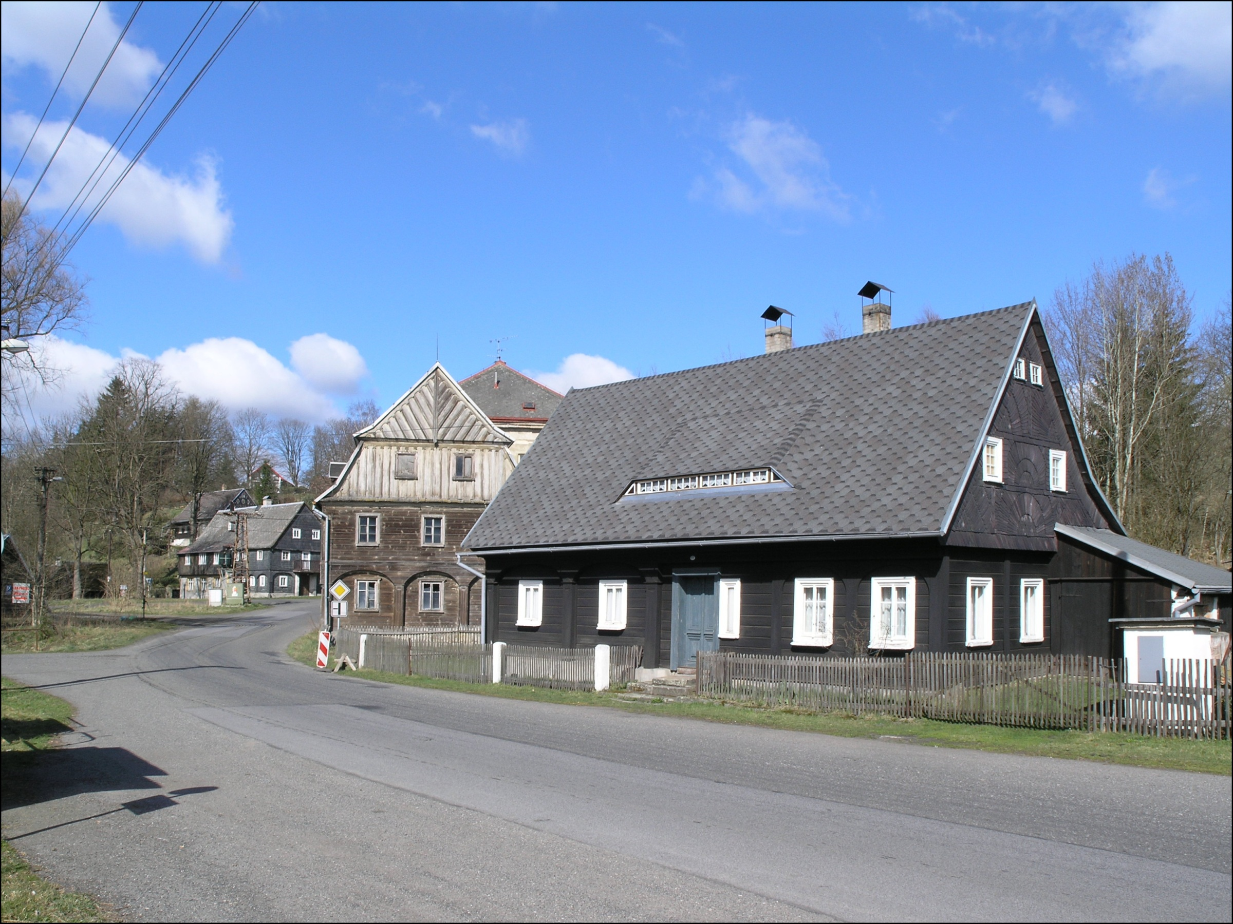 Brtníky